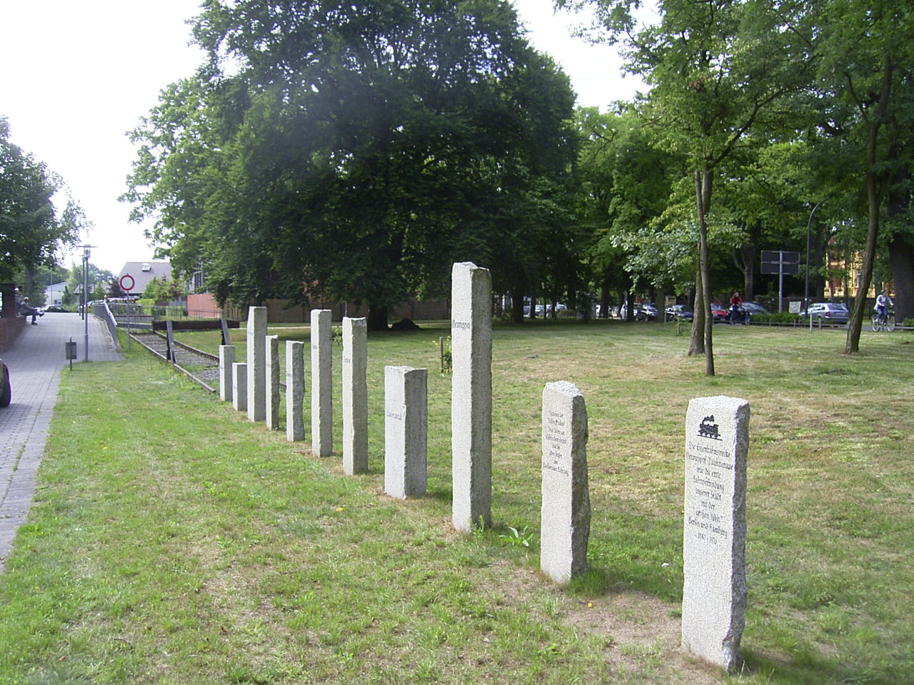 Denkmal für die Paulinenaue-Neuruppiner Eisenbahn, die 1970 stillgelegt worden ist..